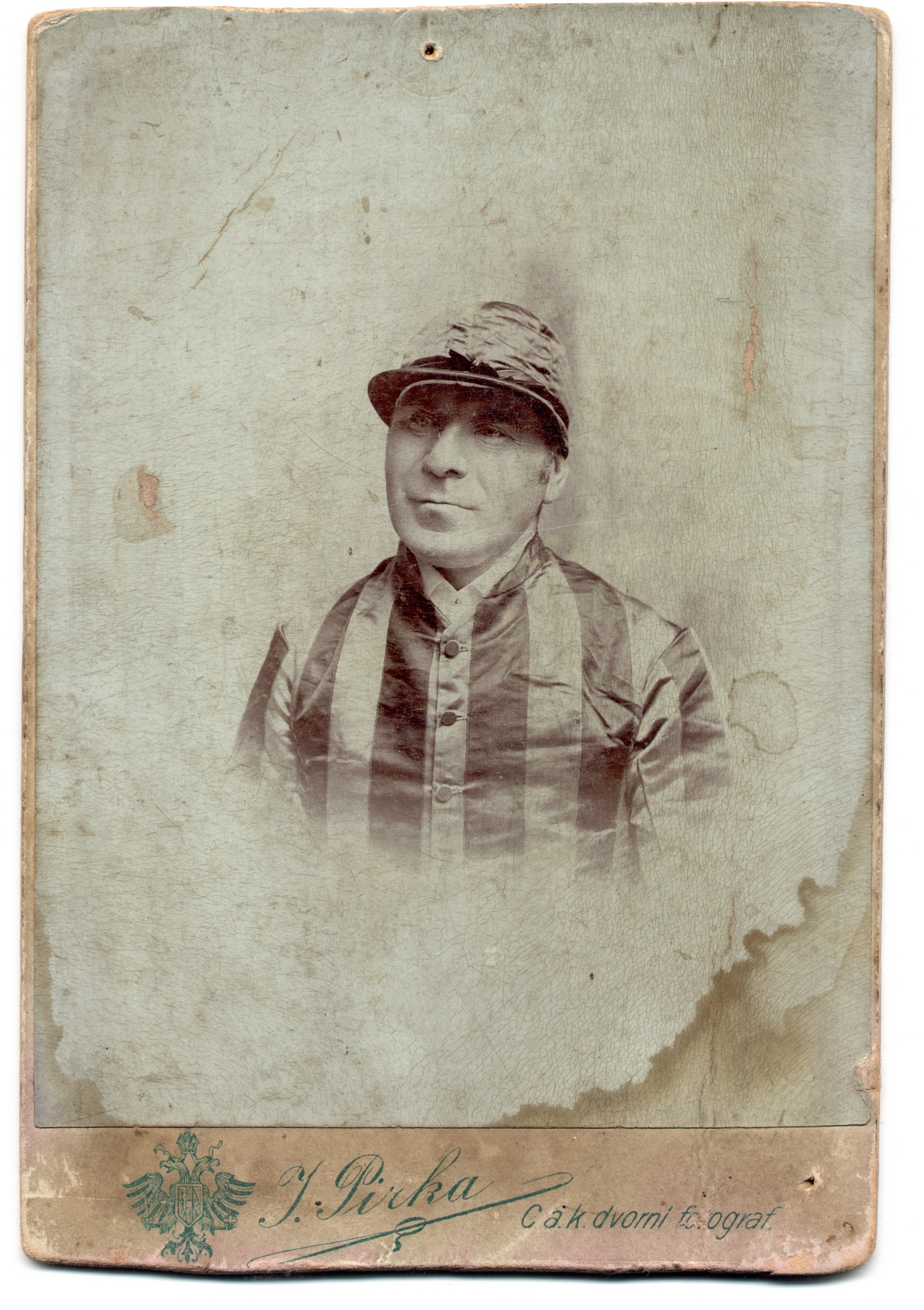 Fotografie Richarda Harryho Fletchera vyfocena Josefem Pirkem z Pardubic